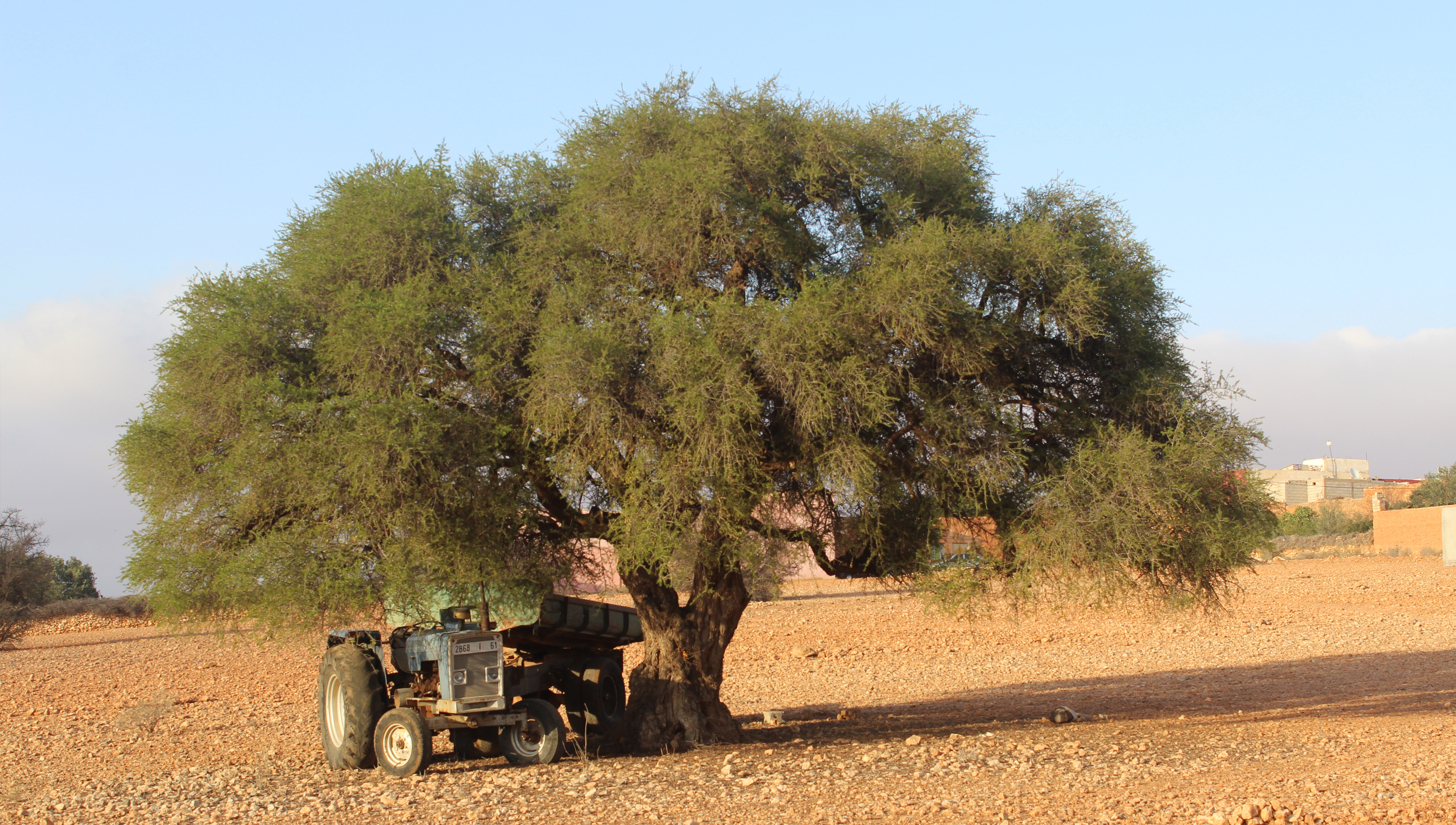 شجرة الأركان بقرية إدوبلا بنواحي مدينة تيزنيت.